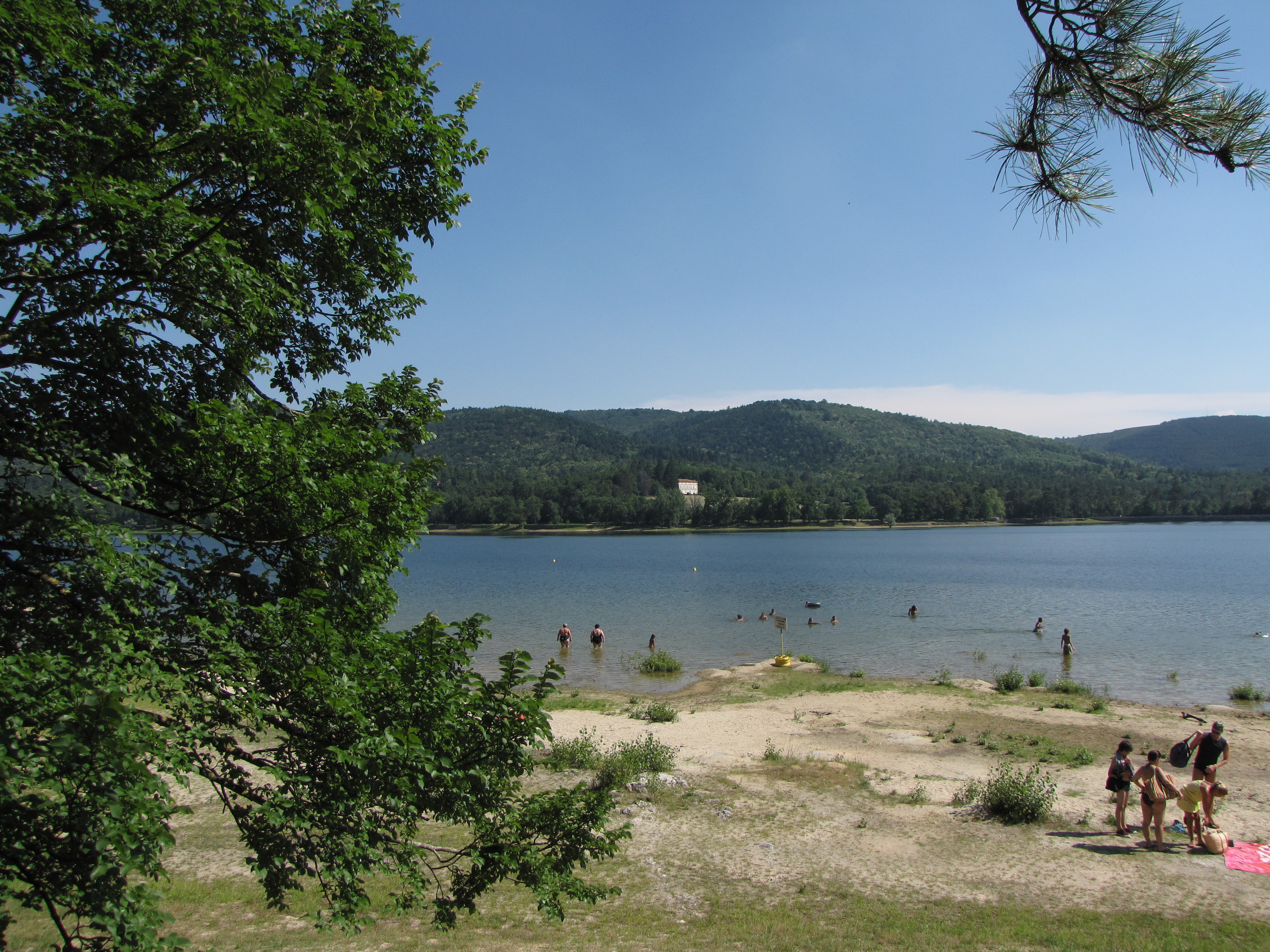 Lac de Saint-Féréol